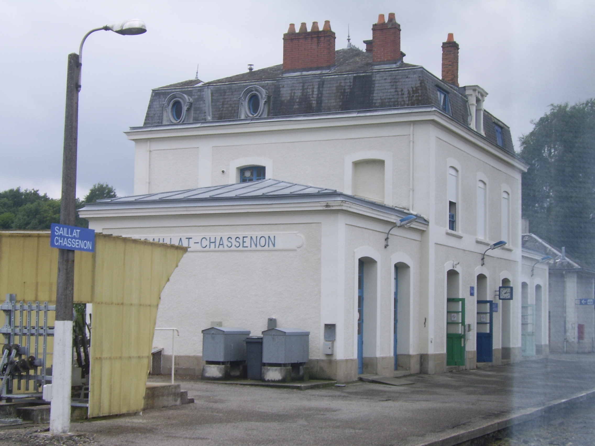 Gare SNCF de Saillat-Chassenon (Haute-Vienne, France)